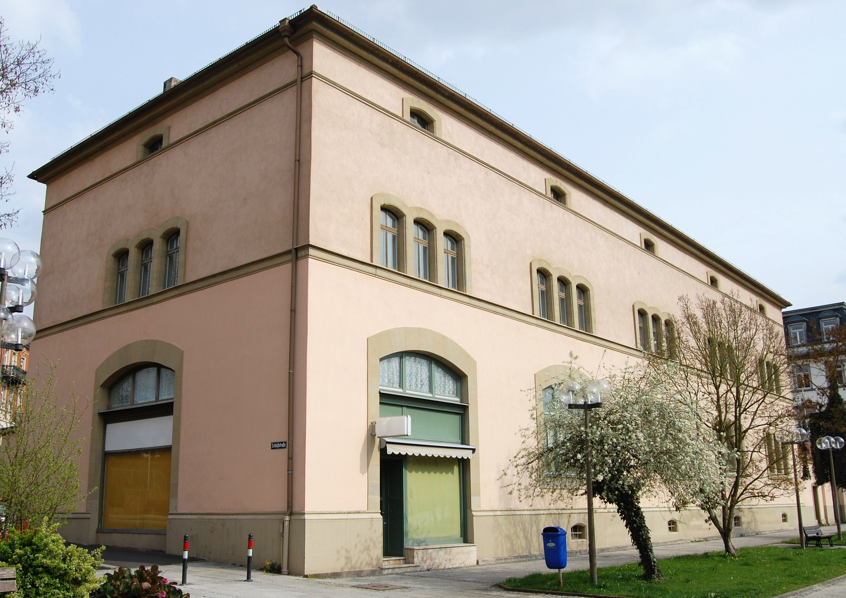 Krugmagazin in Bad Kissingen; Bauwerk von Friedrich von Gärtner, Baujahr 1839